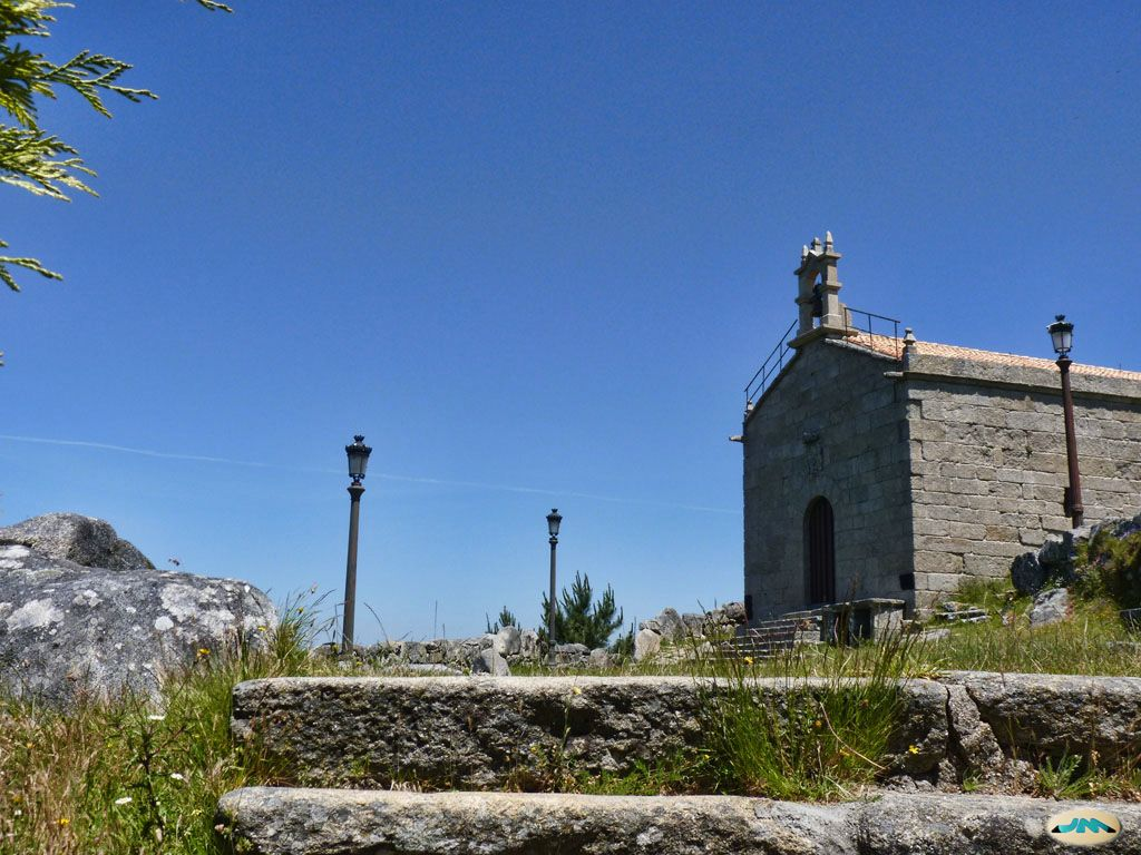 Monte Alba, Serra do Galiñeiro, Vigo